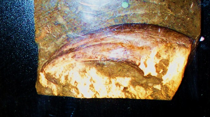 Fossil of Altispinax, an extinct dinosaur-- Took the photo at Natural History Museum, London